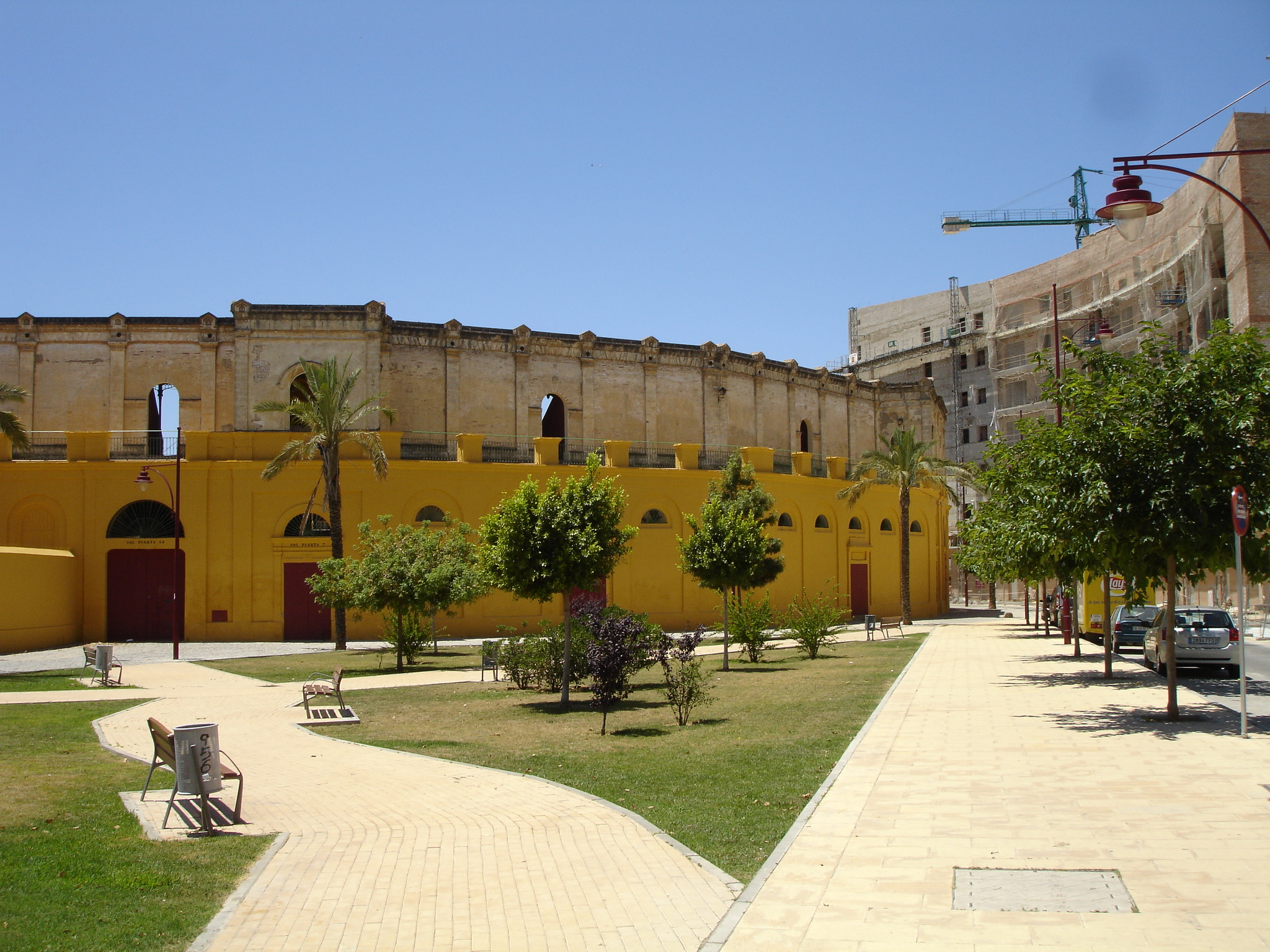 Plaza de toros. Jerez de la Frontera, Andalusia (Spain)